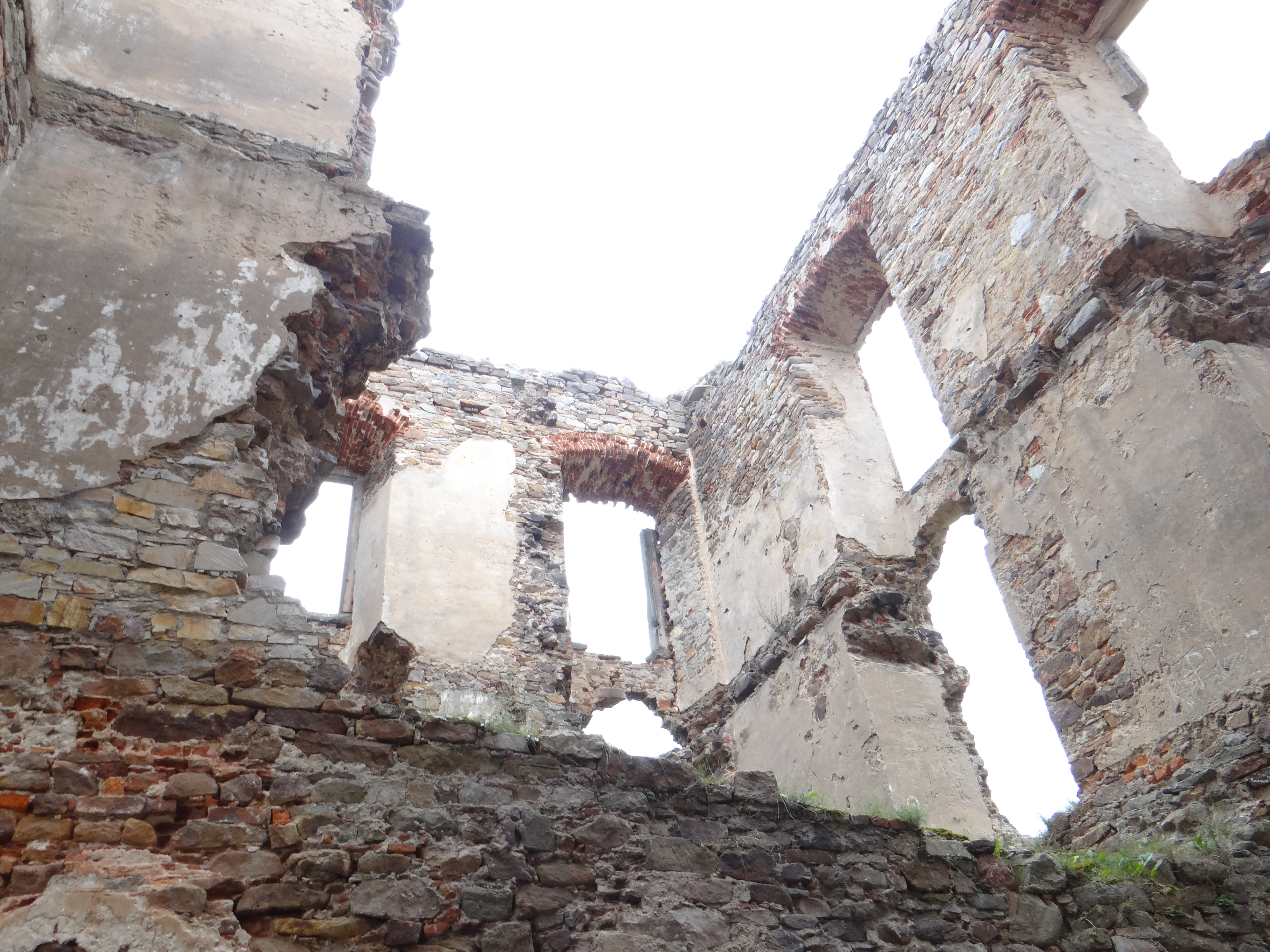 Ruiny zamku w Bodzentynie